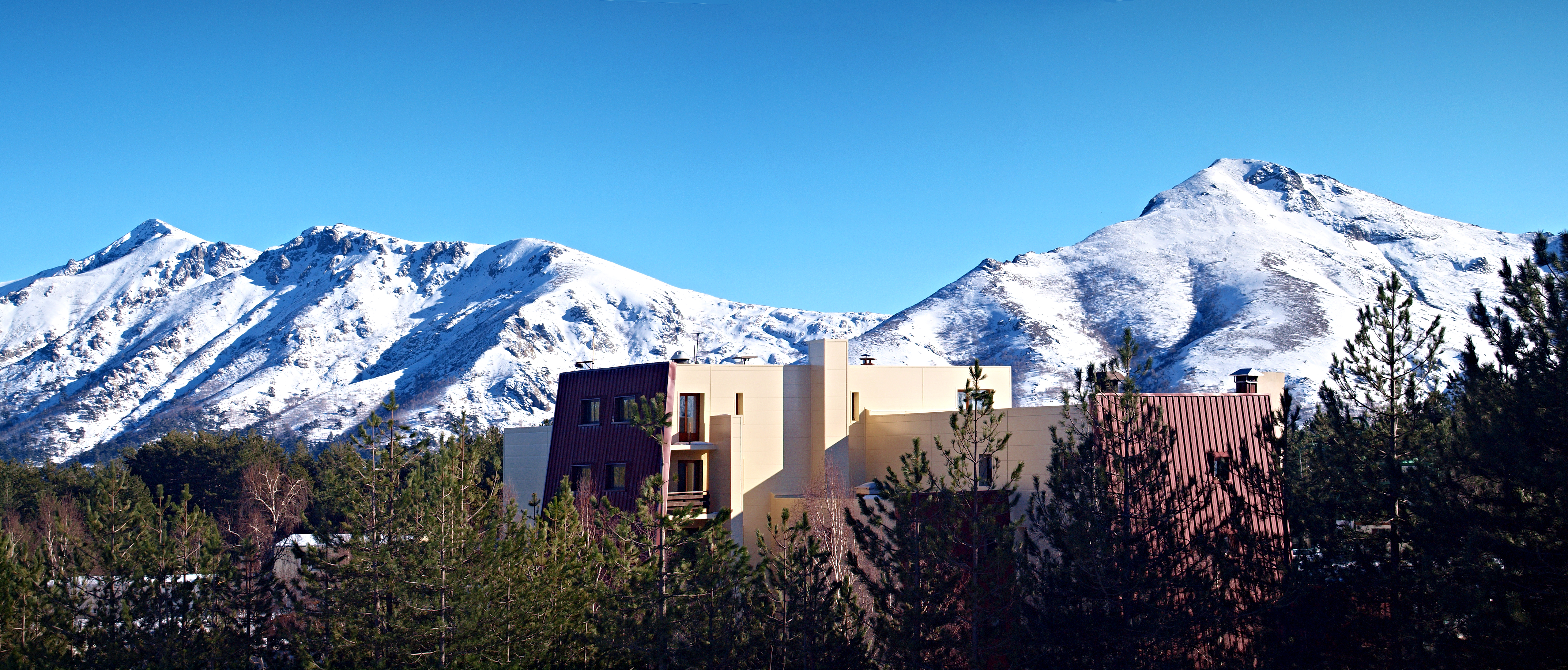 Albertacce (Corse) - Panorama de Punta Artica (2327 m), Bocca di Frame (2084 m) et Capu di u Facciatu (2113 m)